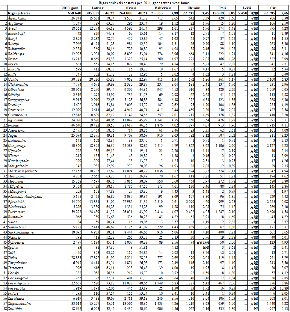 2011.gada Tautas skaitīšana